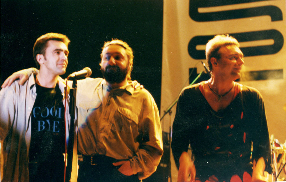 1990 Тур «За будущее свободной России» В.Бутусов, С.Намин, К.Кинчев